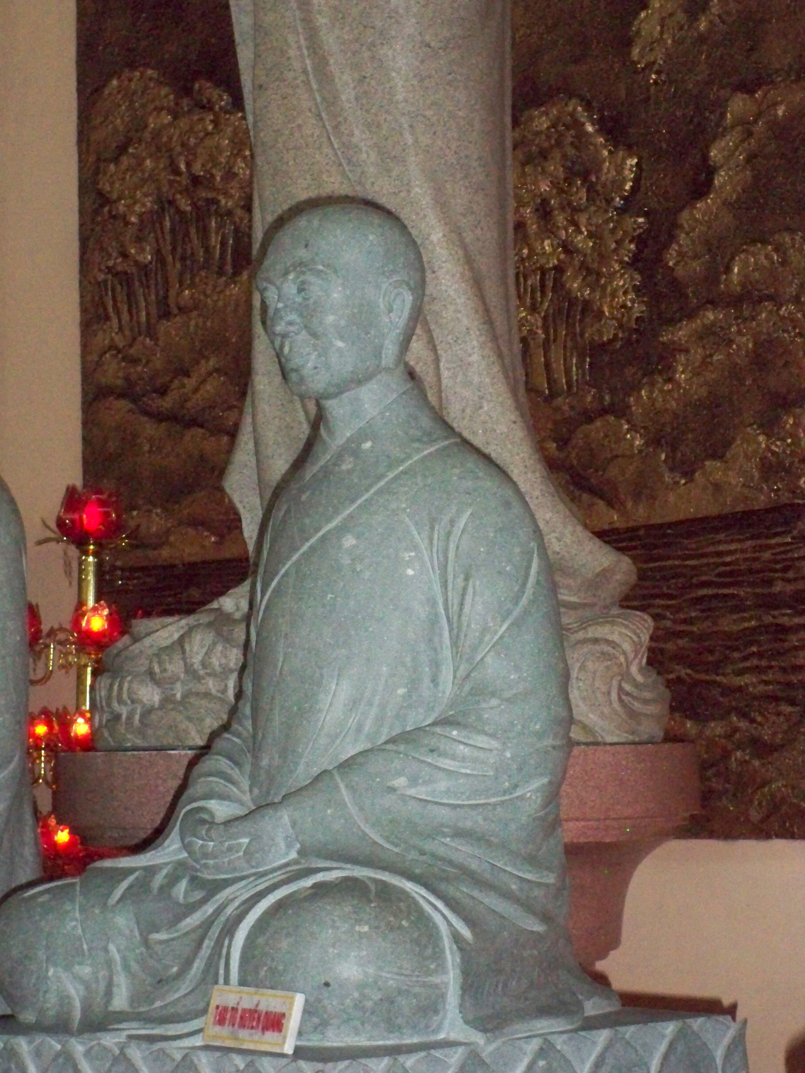 Tam tổ Huyền Quang trong Thiền Viện Trúc Lâm - Đà Lạt / Huyen Quang Monk in Truc Lam - Da Lat city